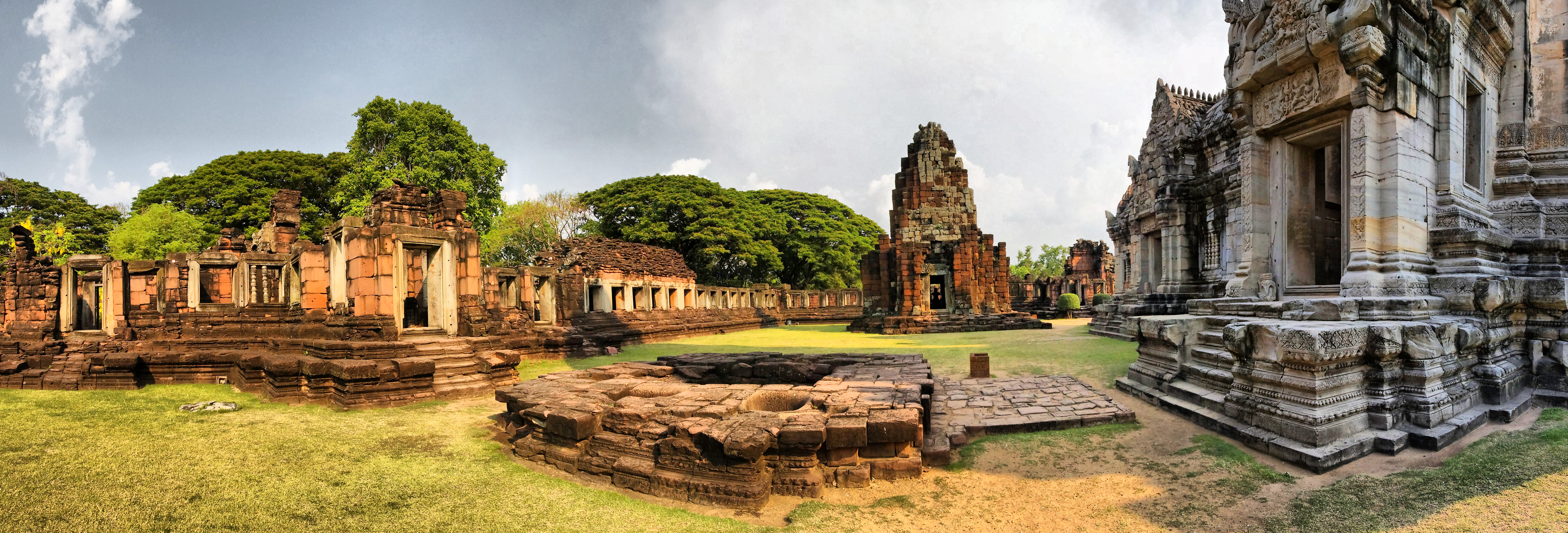 Phimai, Thailande